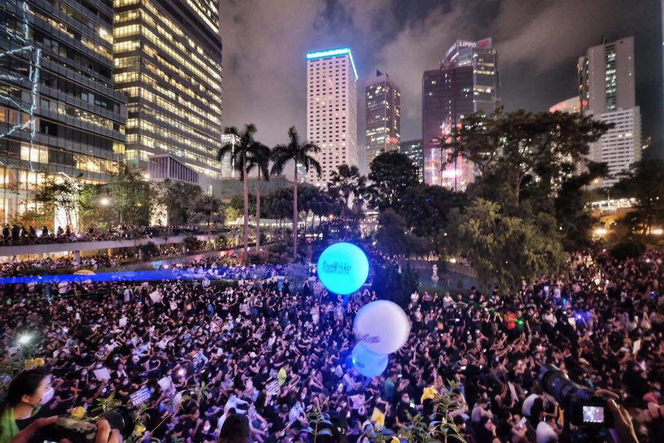 中文（香港）: 香港METOO遊行